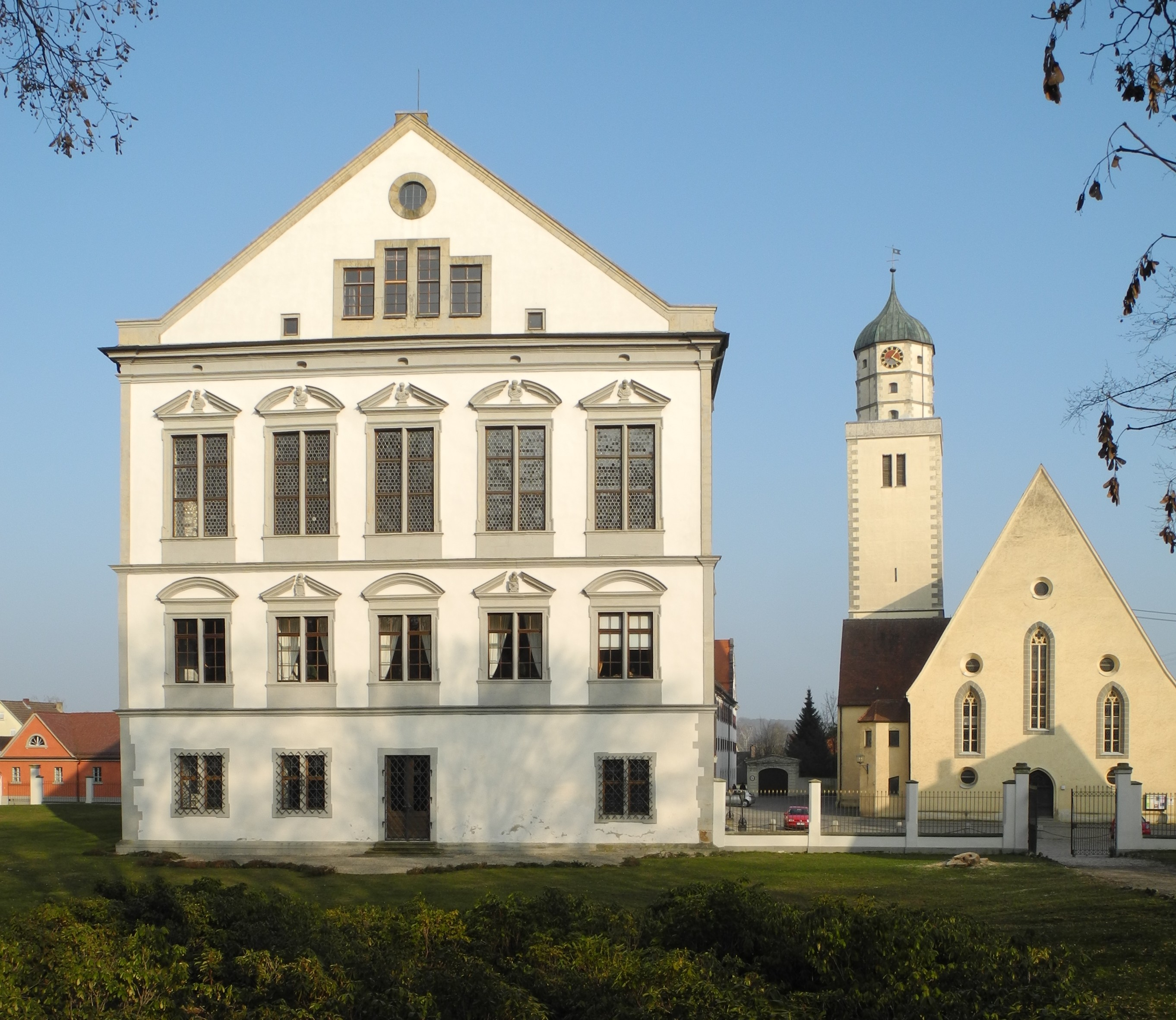 Oettingen in Bayern - Schloss und St. Jakobskirche